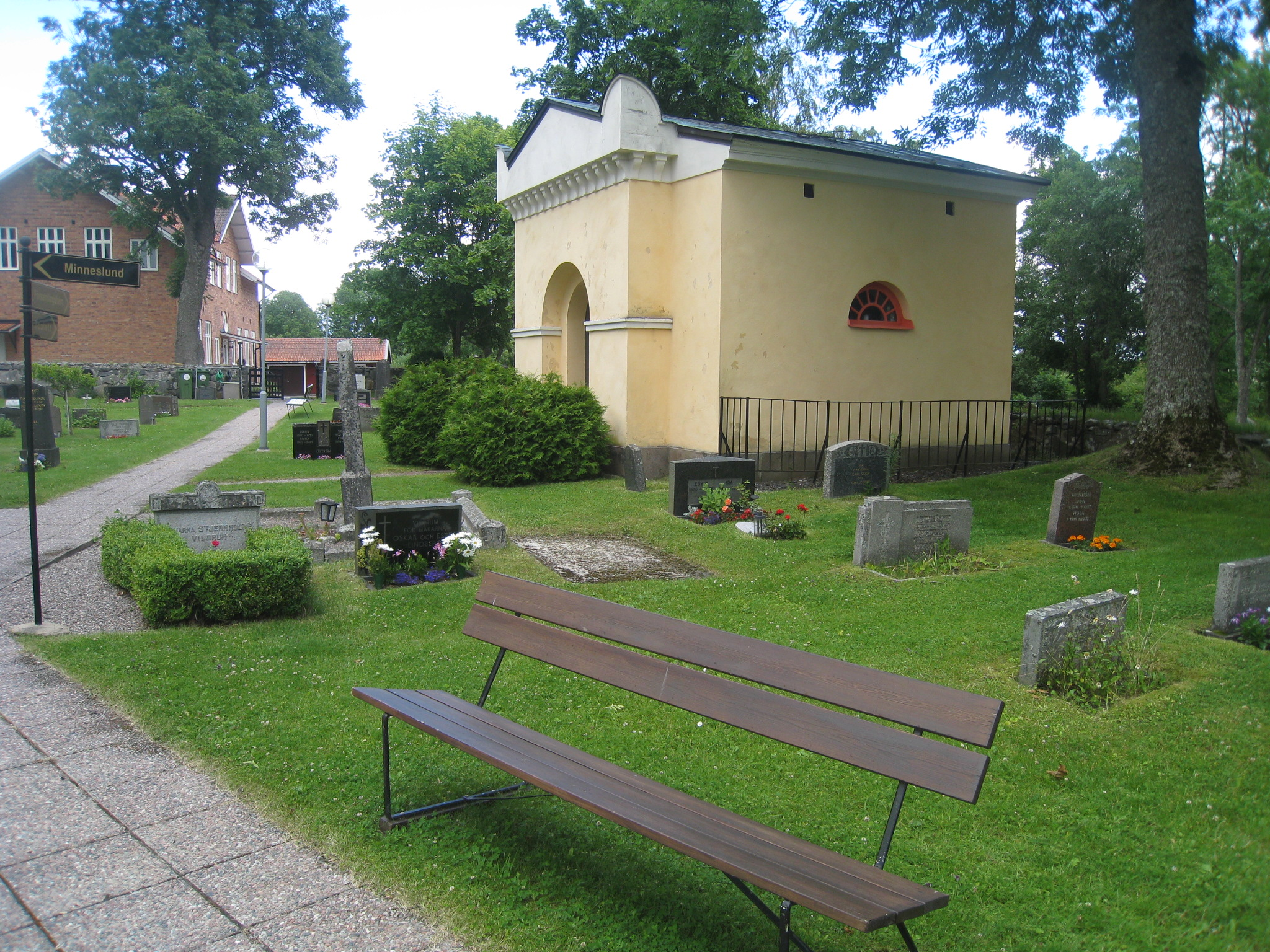 Rö kyrka, Roslagen, Uppland. Silverstolpeska gravkoret uppfört 1840-1841, vid kyrkogårdens södra sida. (Silverstolpe (även Silfverstolpe) är en svensk adlig ätt som tidigare hette Hesselgren.) I det Silverstolpeska gravkoret vid Rö kyrka vilar Fredrik Samuel Silverstolpe och hans hustru Fredrika Carolina Mannerheim till Näs samt deras ende son, som levde 1812-1828. Monumentet är byggt runt en stor tumba av sandsten och ritades av konduktören vid Överståthållarämbetet Samuel Enander omkring år 1840.